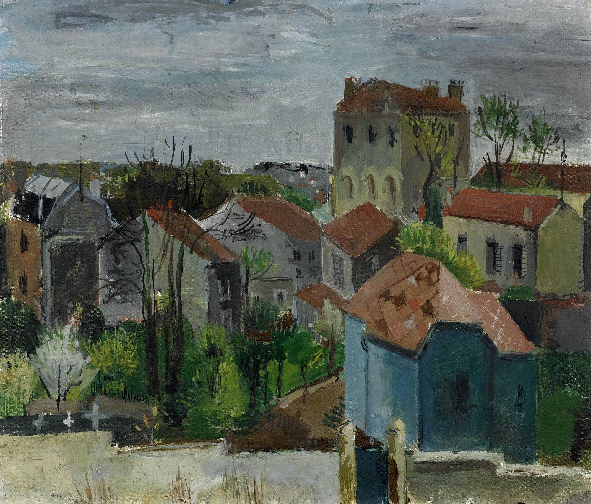 Pariser Vorort im Frühling. Um 1928. Öl auf Leinwand. Unten links Reste der Signatur. 46 x 55 cm.